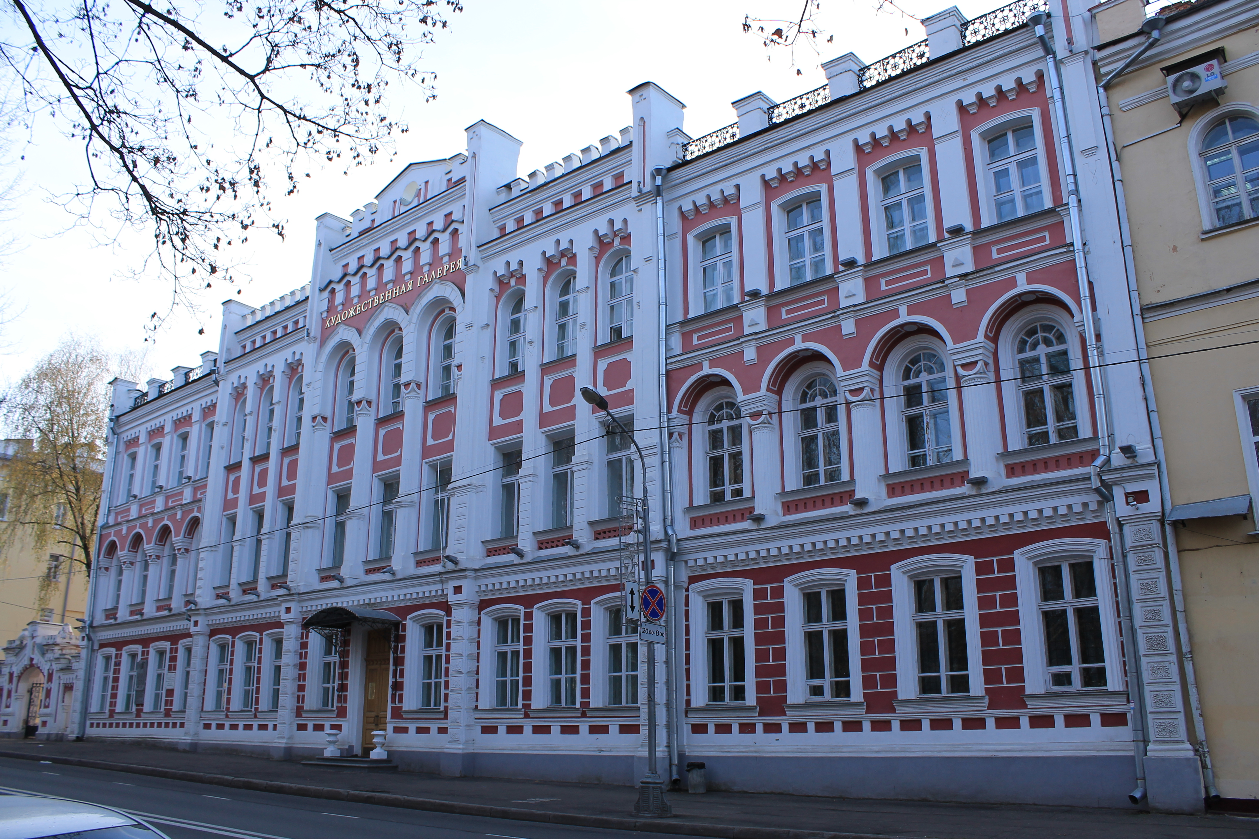 Здание реального училища (Смоленская область, Смоленск, улица Коммунистическая, 4)